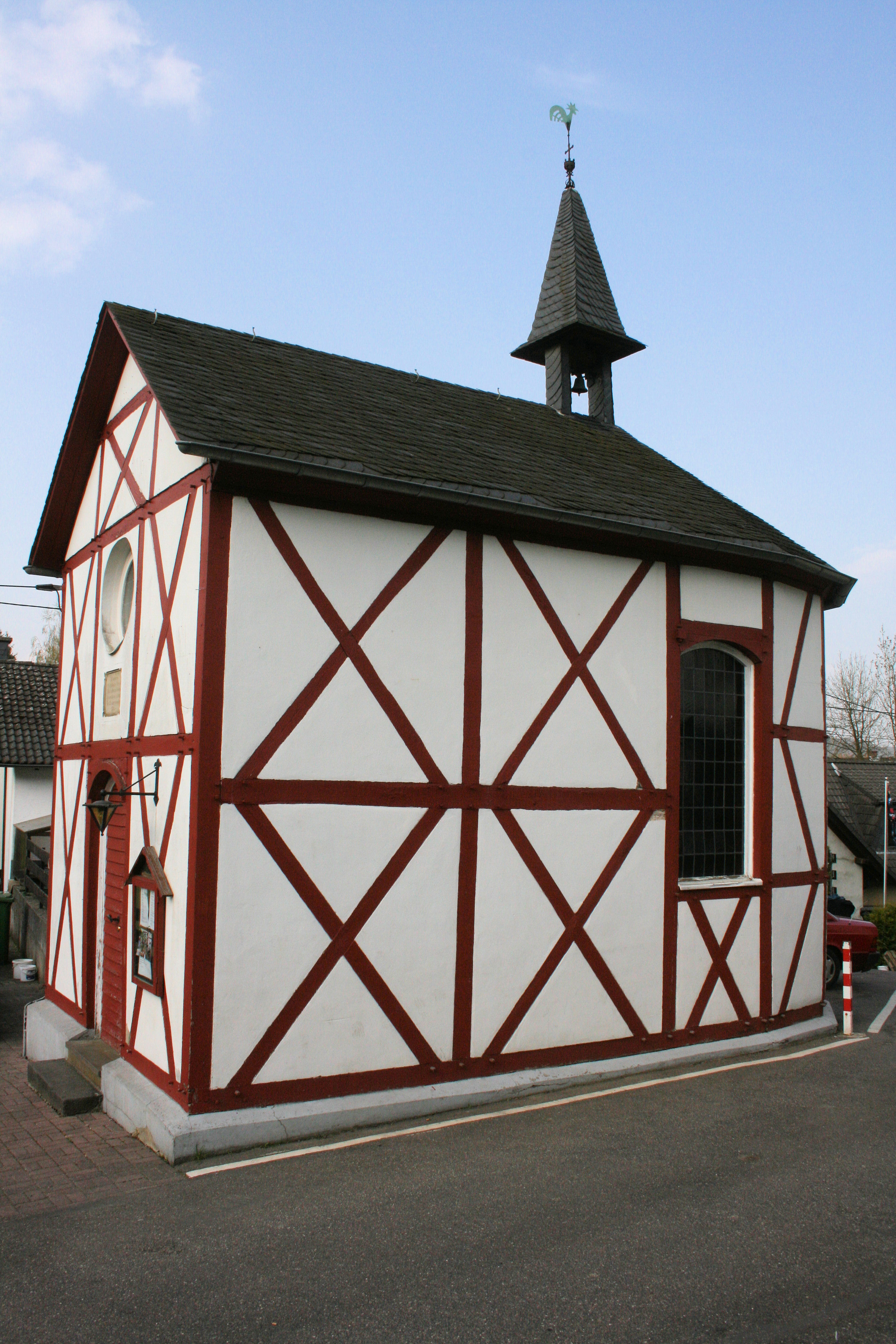 Apolloniakapelle Stein, Hennef (Sieg)